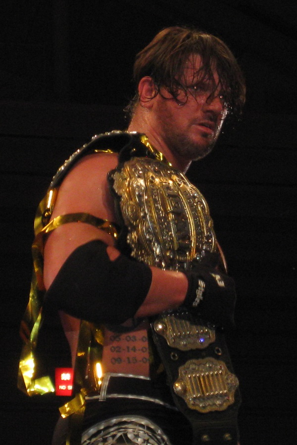 2015年2月11日 大阪府立体育会館 「THE NEW BEGINNING in OSAKA」 AJスタイルズ